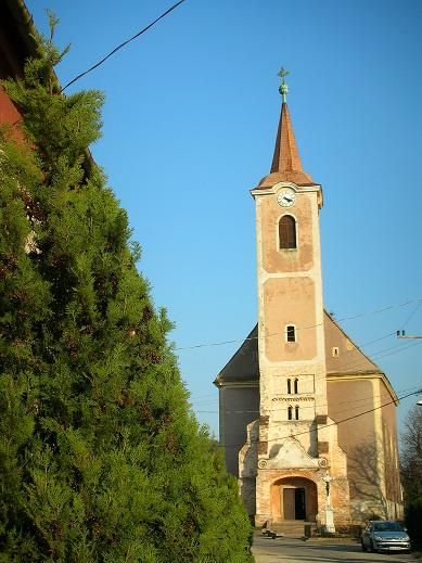 Kővágószőlős, templom